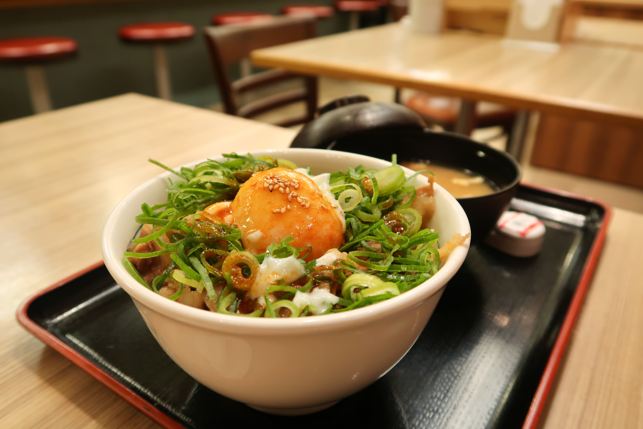 Matsuya rice